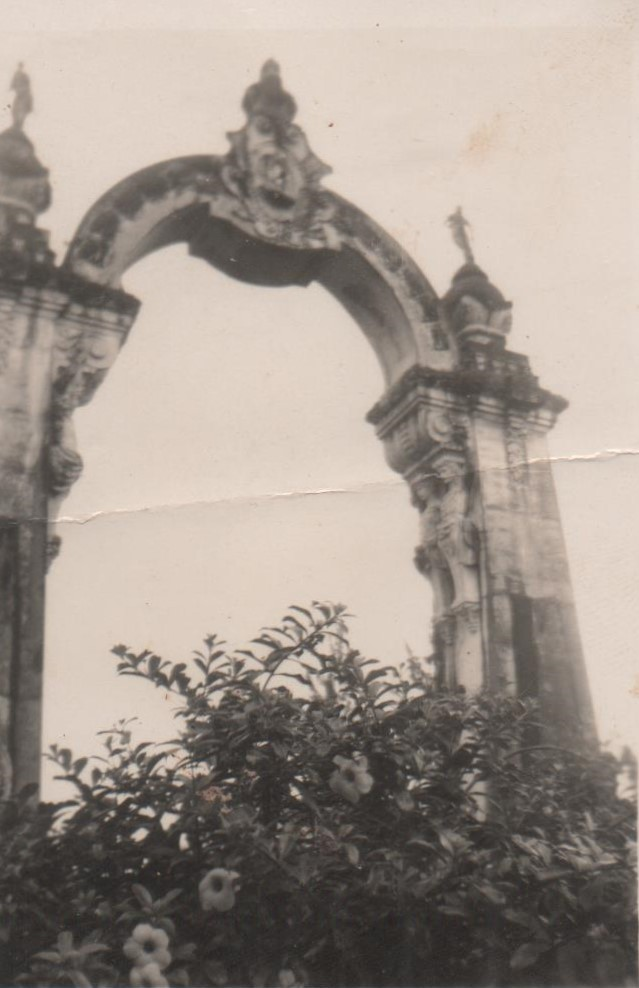 Arco de Carabobo el 3 de julio de 1939